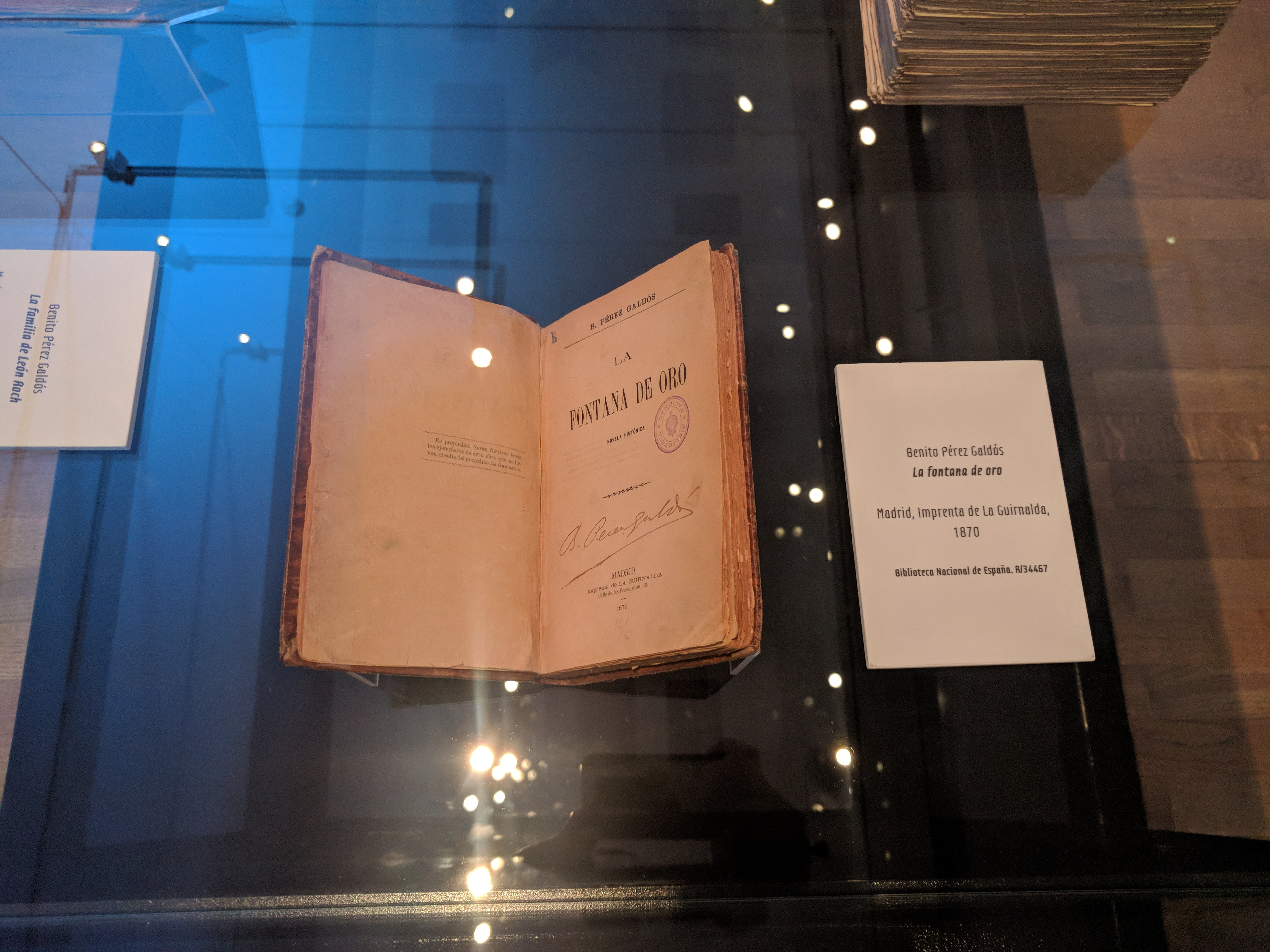 Primera edición de La Fontana de Oro de Benito Pérez Galdós, 1870, editorial La Guirnalda. Biblioteca Nacional de España.